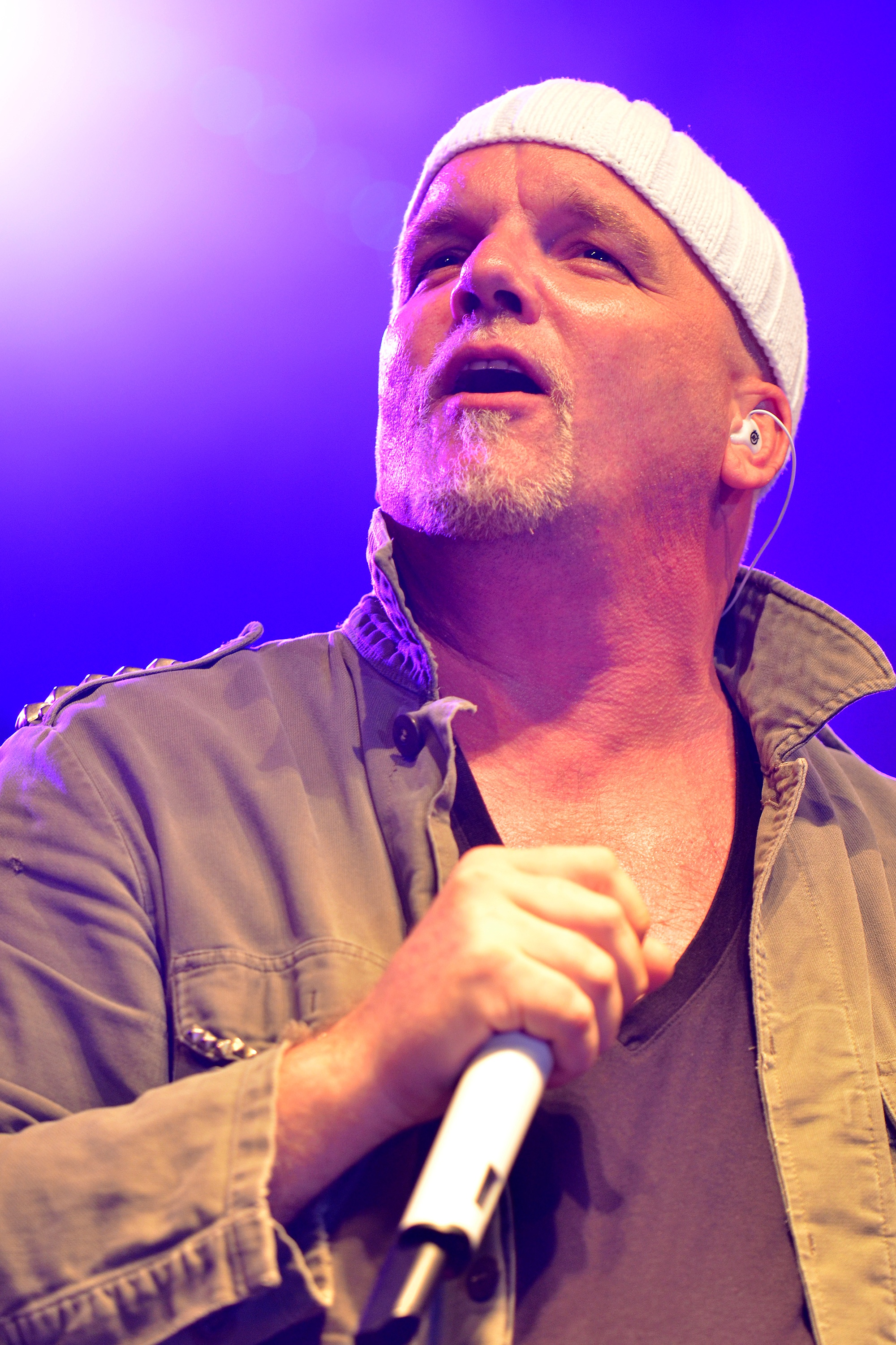 DJ Ötzi, Auftritt beim Kurparkfest Hamm 2014